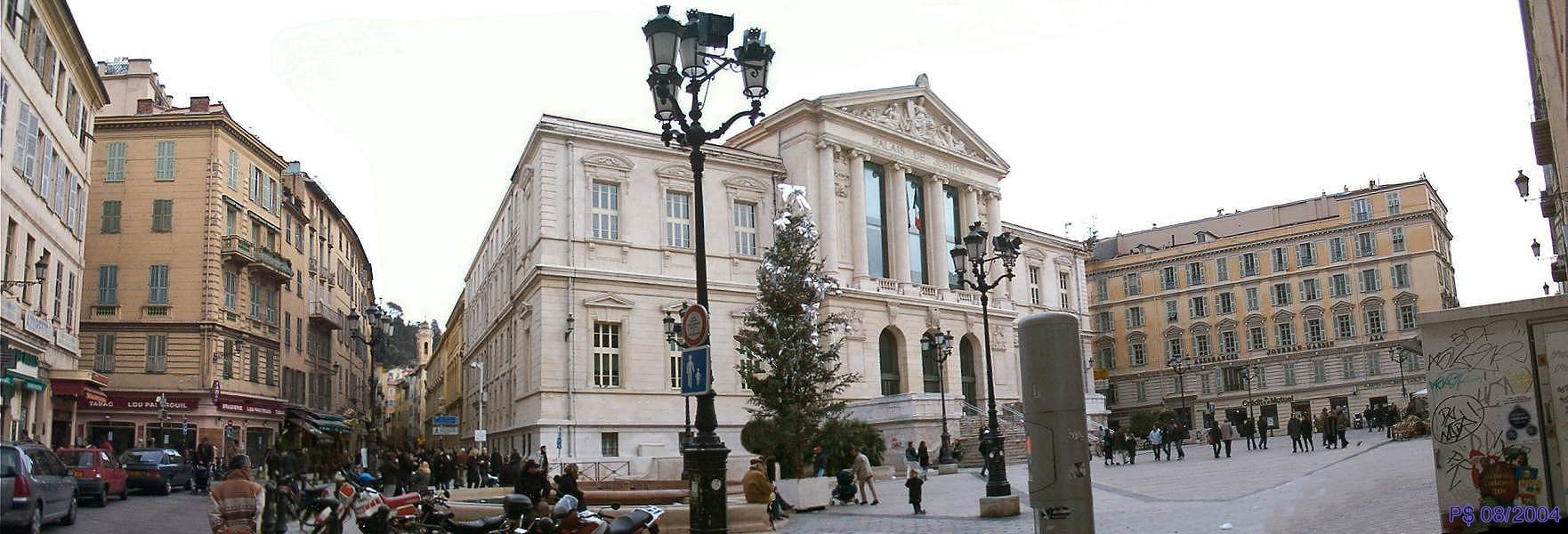 Nice-VieilleVille Place du Palais